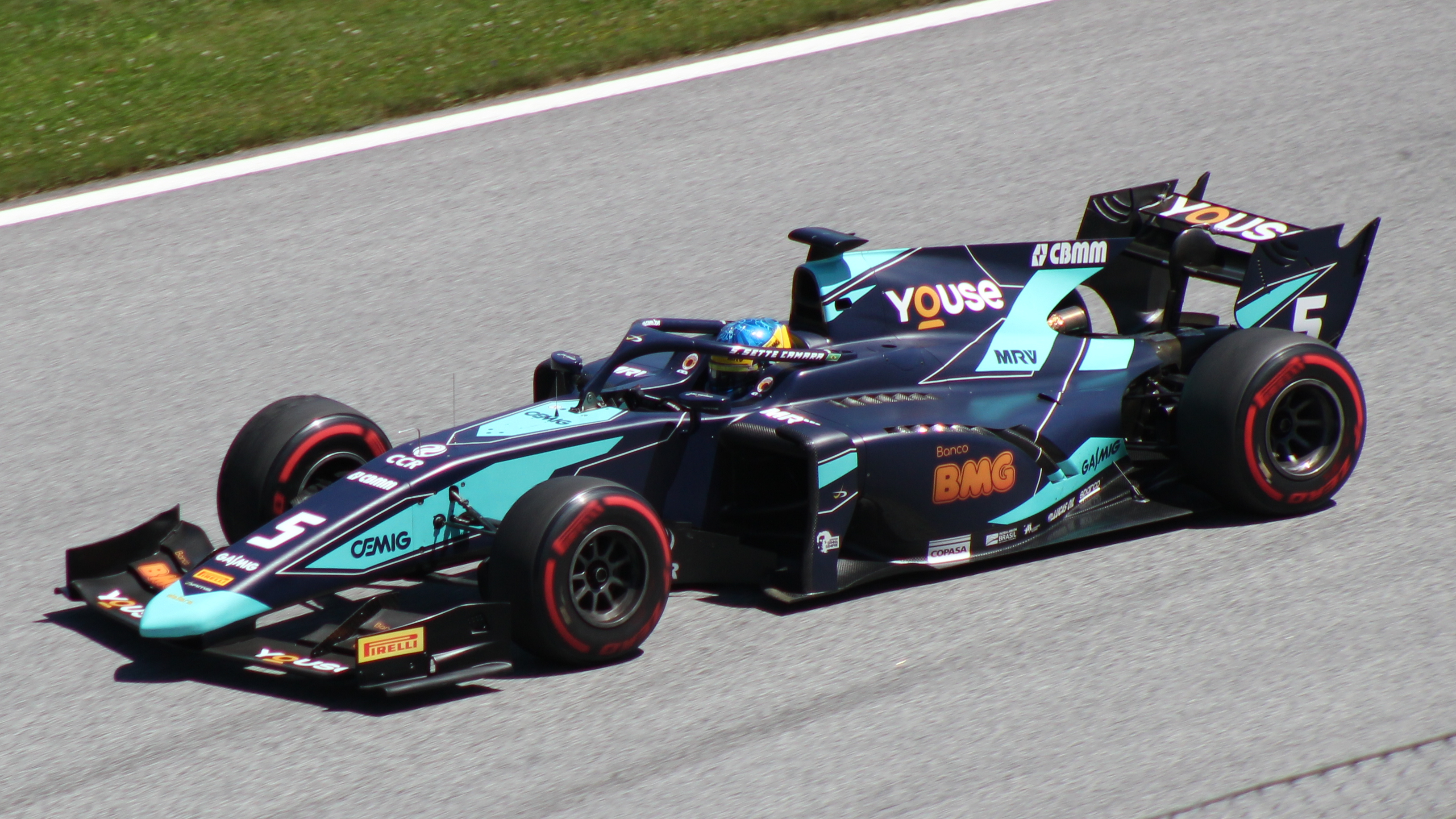 Sette Camara beim Rennwochenende in Österreich 2019